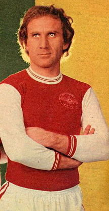 حسین کلانی فوروارد باشگاه فوتبال پرسپولیس تهران در دهه پنجاه خورشیدی